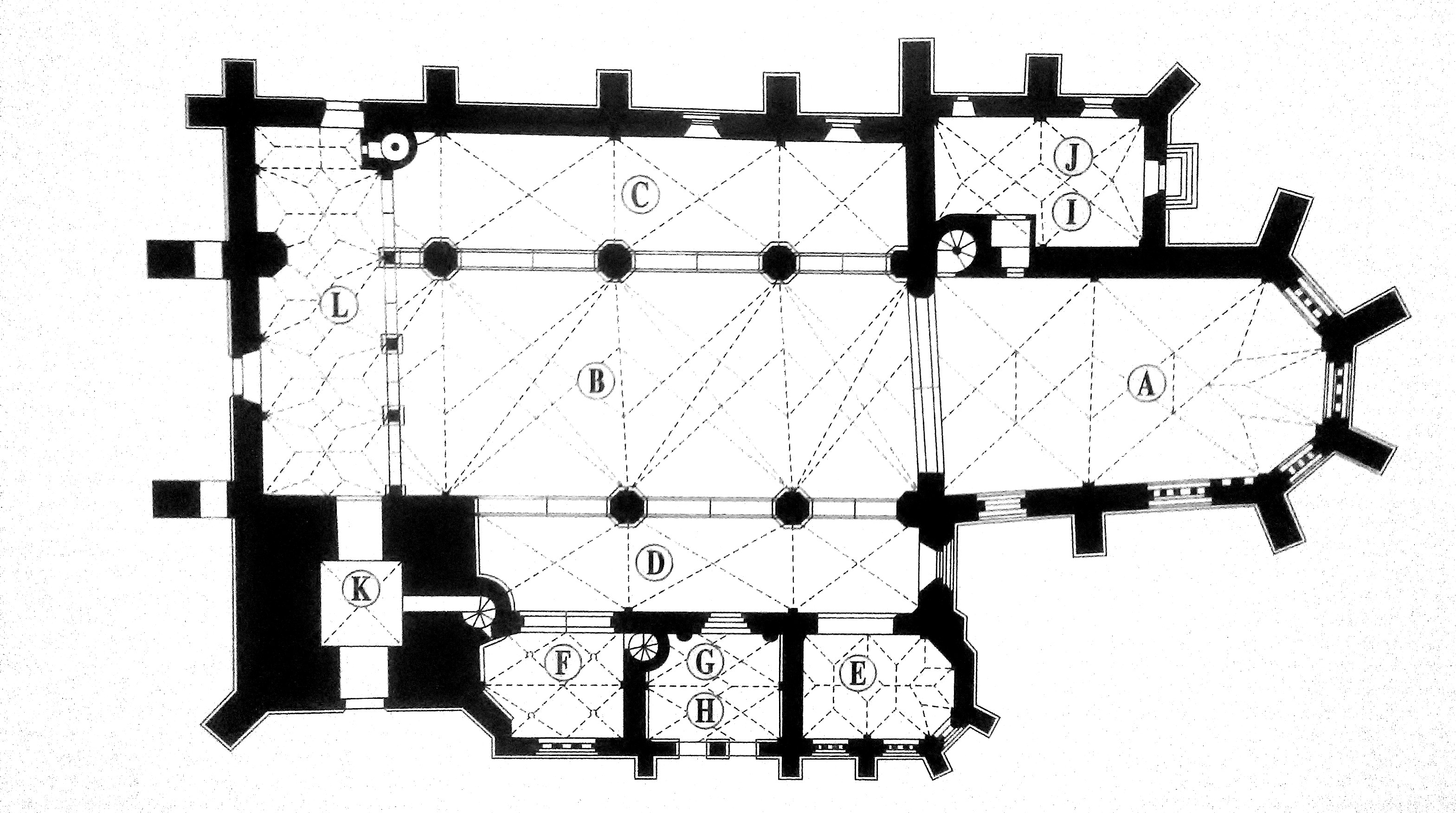 Ground plan of Basilica of St. Giles